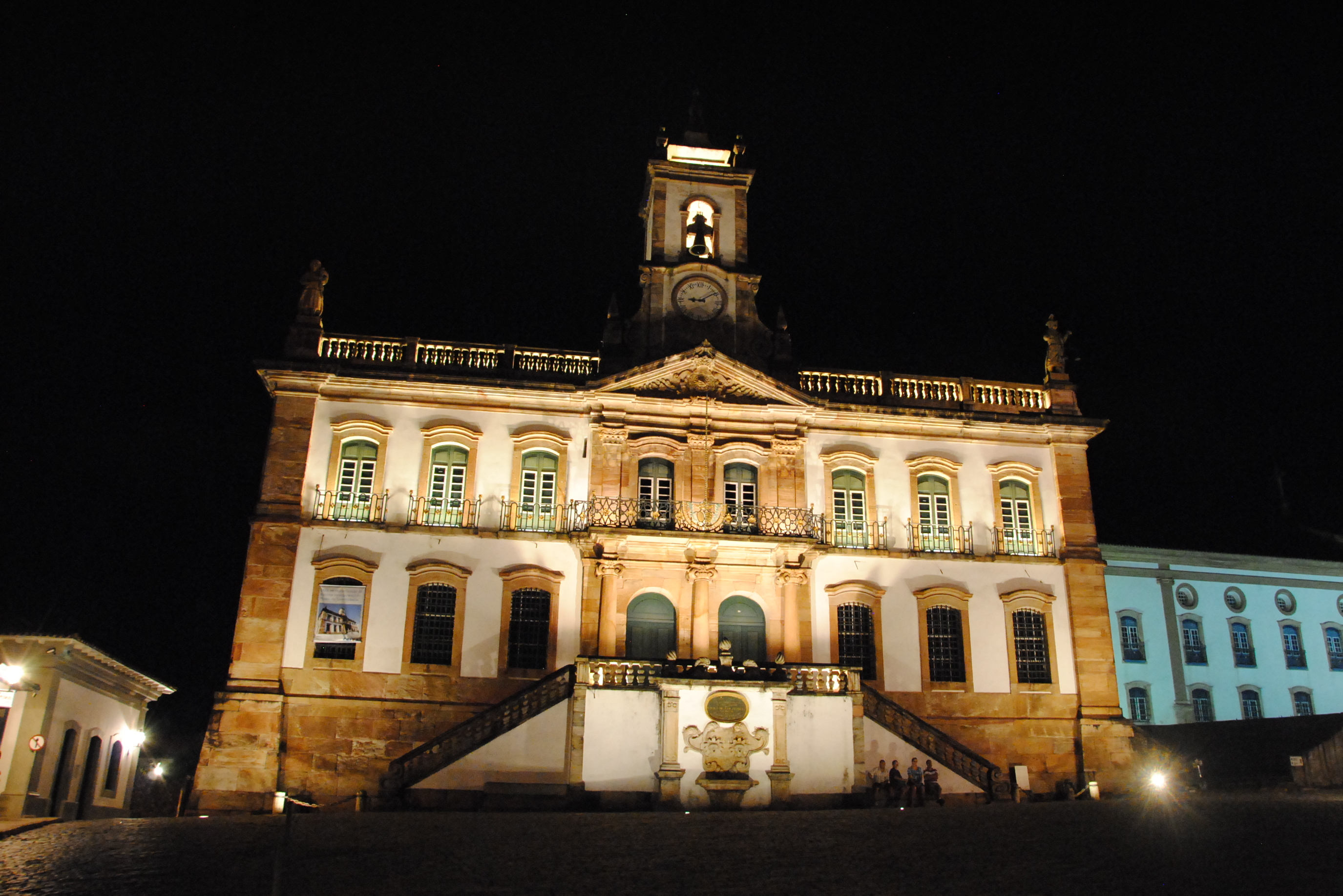 Ouro Preto (MG), Brazil